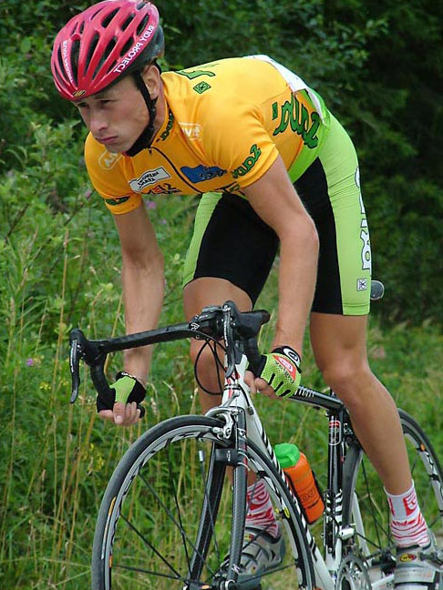 Tour de Slovakia 2004, time trial to Martinske Hole Autor: Peter Krsko, Slovakia